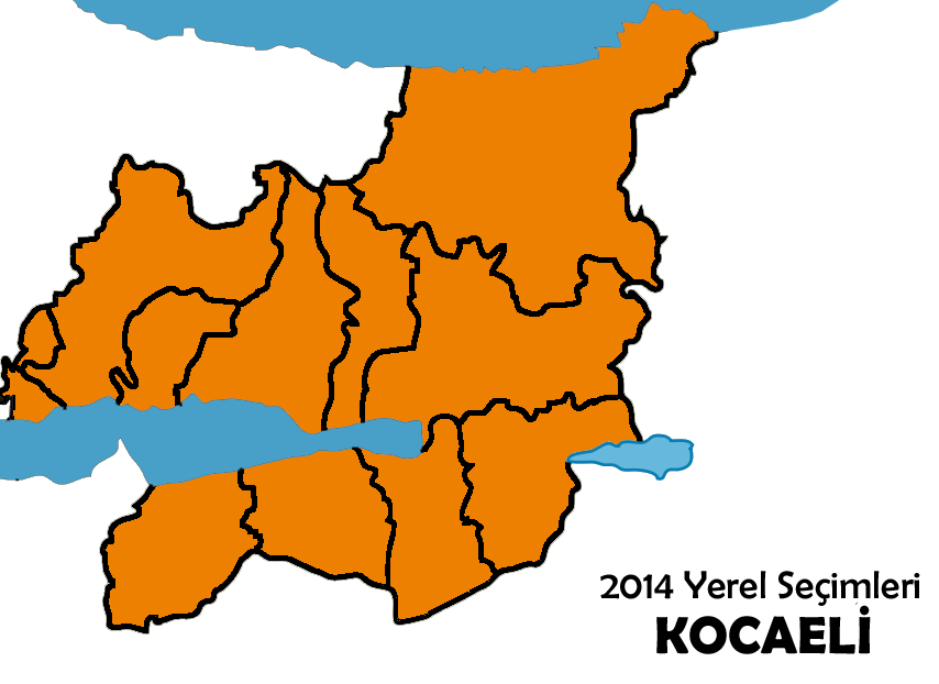 2014 Türkiye yerel seçimleri